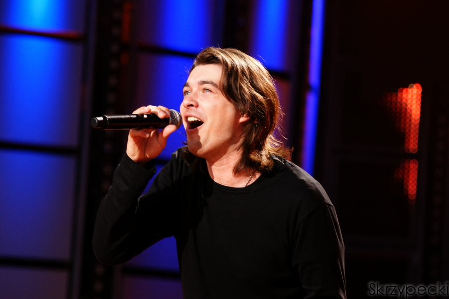 Tomasz Szczepanik (Pectus), 11 czerwca 2009 r.